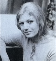 Tablica pamiątkowa przy ul. Trzebnickiej 5 Wrocław